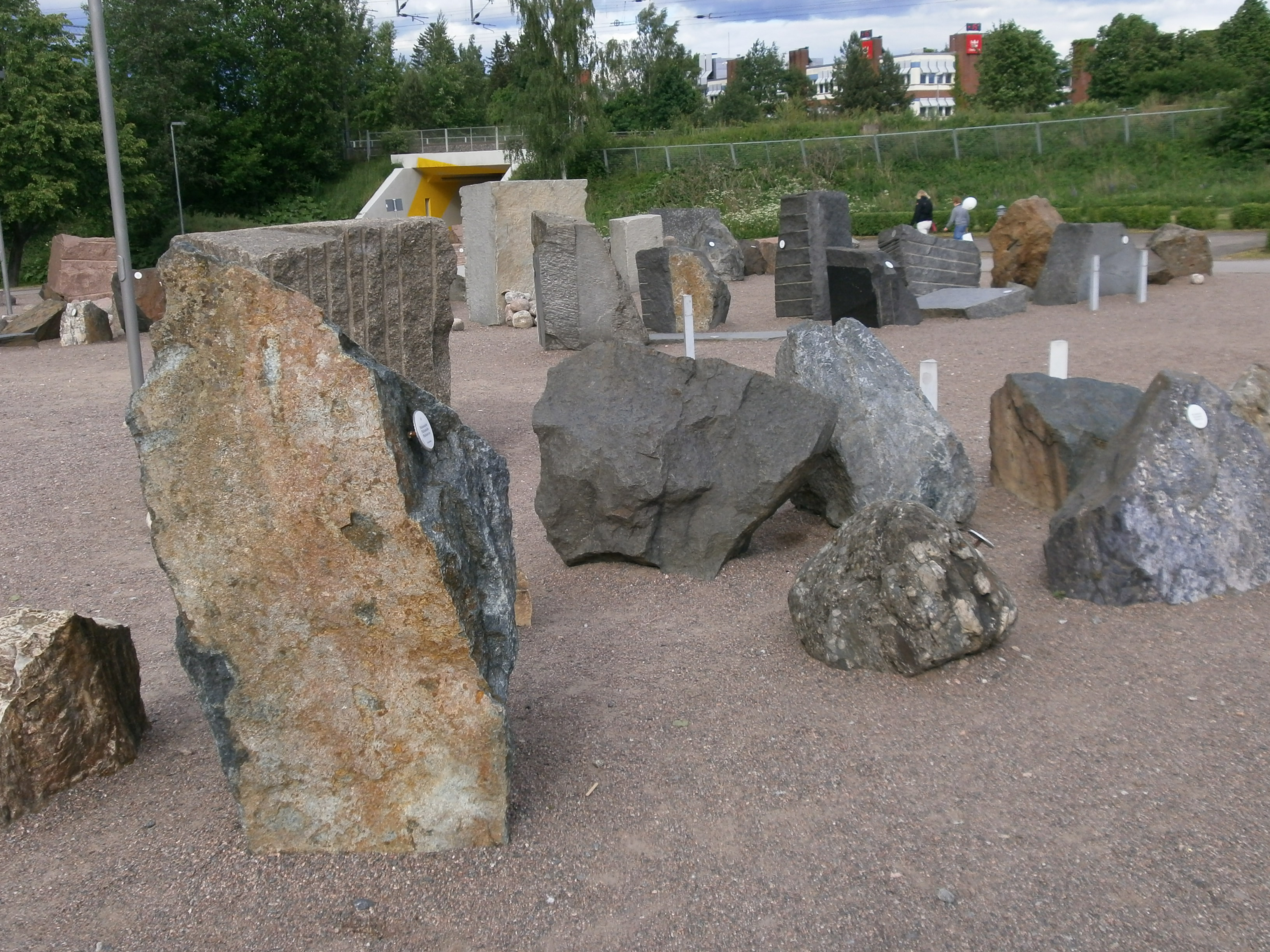 Heurekan ulkopiha.